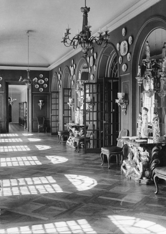 Berlin; Schloss Monbijou